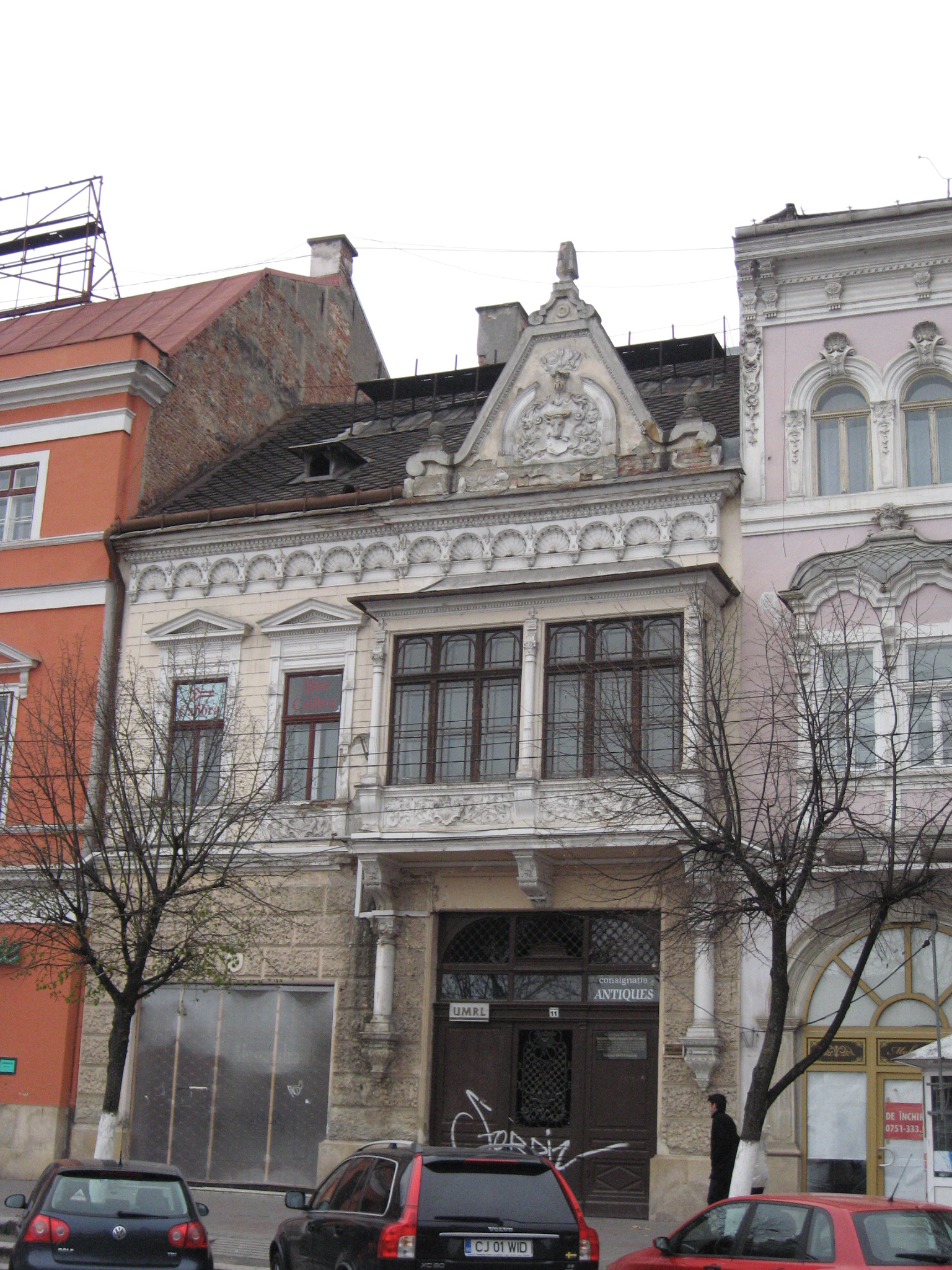 Cluj-Napoca, Casa Wass (Piaţa Unirii nr.11)